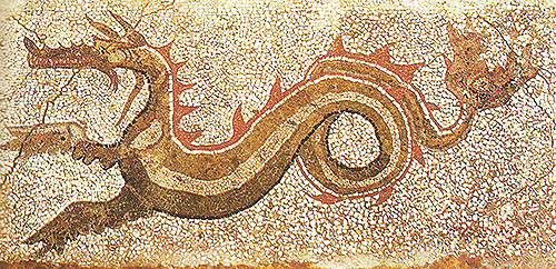 Mosaico proveniente da Kaulon custodito al Museo Nazionale della Magna Grecia di Reggio Calabria